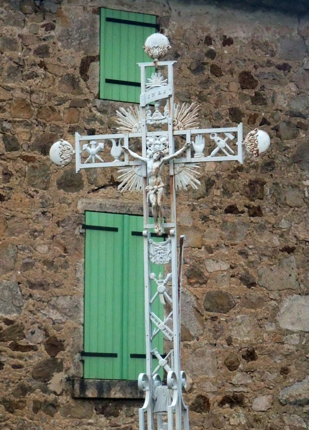 Savas croix des Mariniers